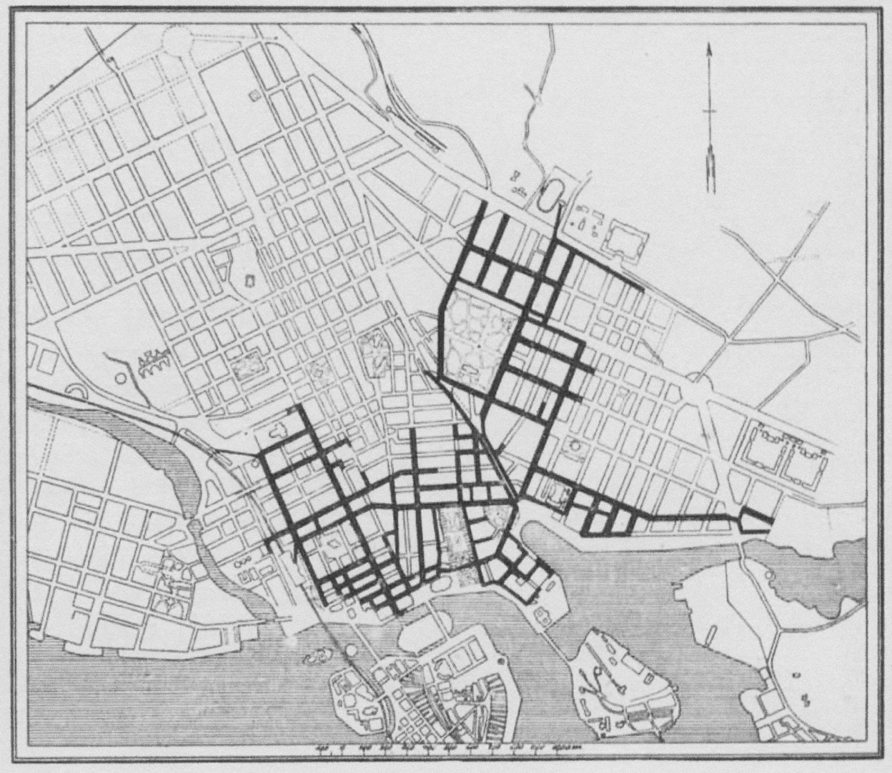 Stockholms elektriska ledningsnätet år 1896